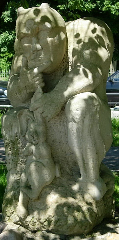 Statue des Teufels mit dem Kaninchen bei Teufelsbrück in Othmarschen.